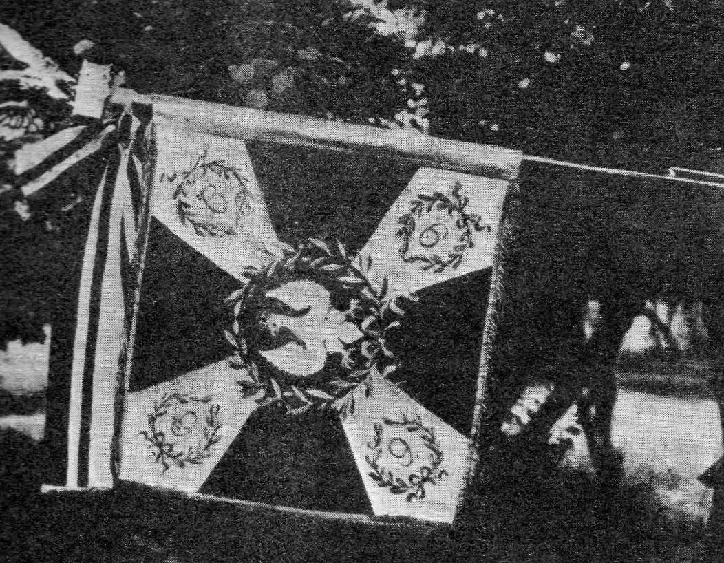 Sztandar 9. Pułku Ułanów - wojna z bolszewikami - 1920r.